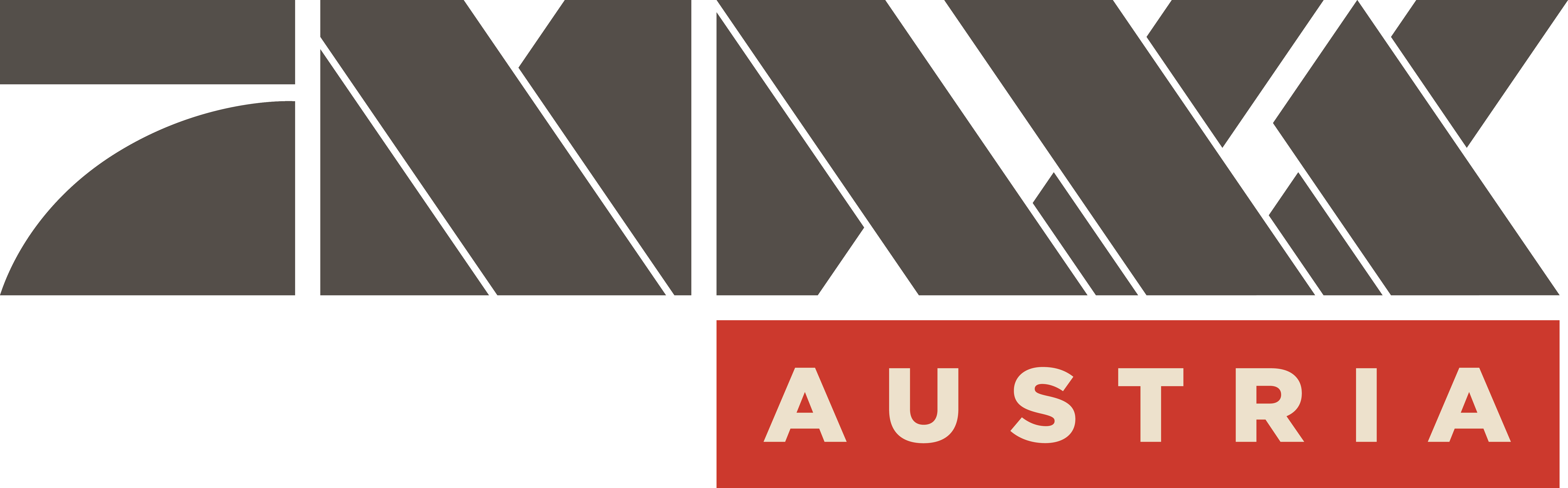 Logo von ProSieben Maxx